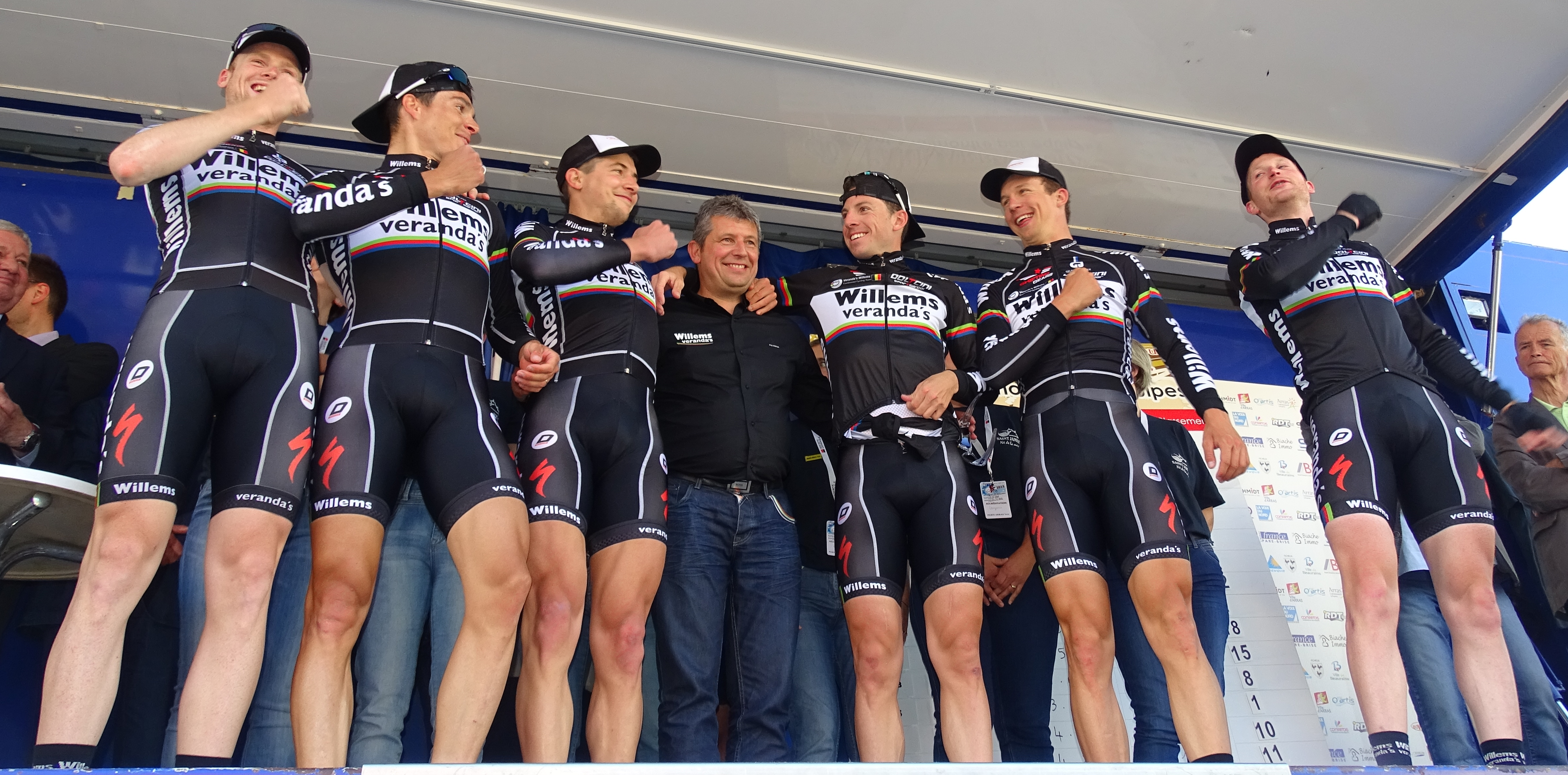 Reportage réalisé le vendredi 22 mai 2015 à l'occasion de l'arrivée du contre-la-montre par équipes de la première étape du Paris-Arras Tour 2015 à Bailleul-Sir-Berthoult, Pas-de-Calais, Nord-Pas-de-Calais, France. Depicted people: Stef Van Zummeren, Olivier Pardini, Christophe Prémont, Gautier De Winter, Gaëtan Bille, Dimitri Claeys and Joeri Calleeuw Depicted team: Verandas Willems